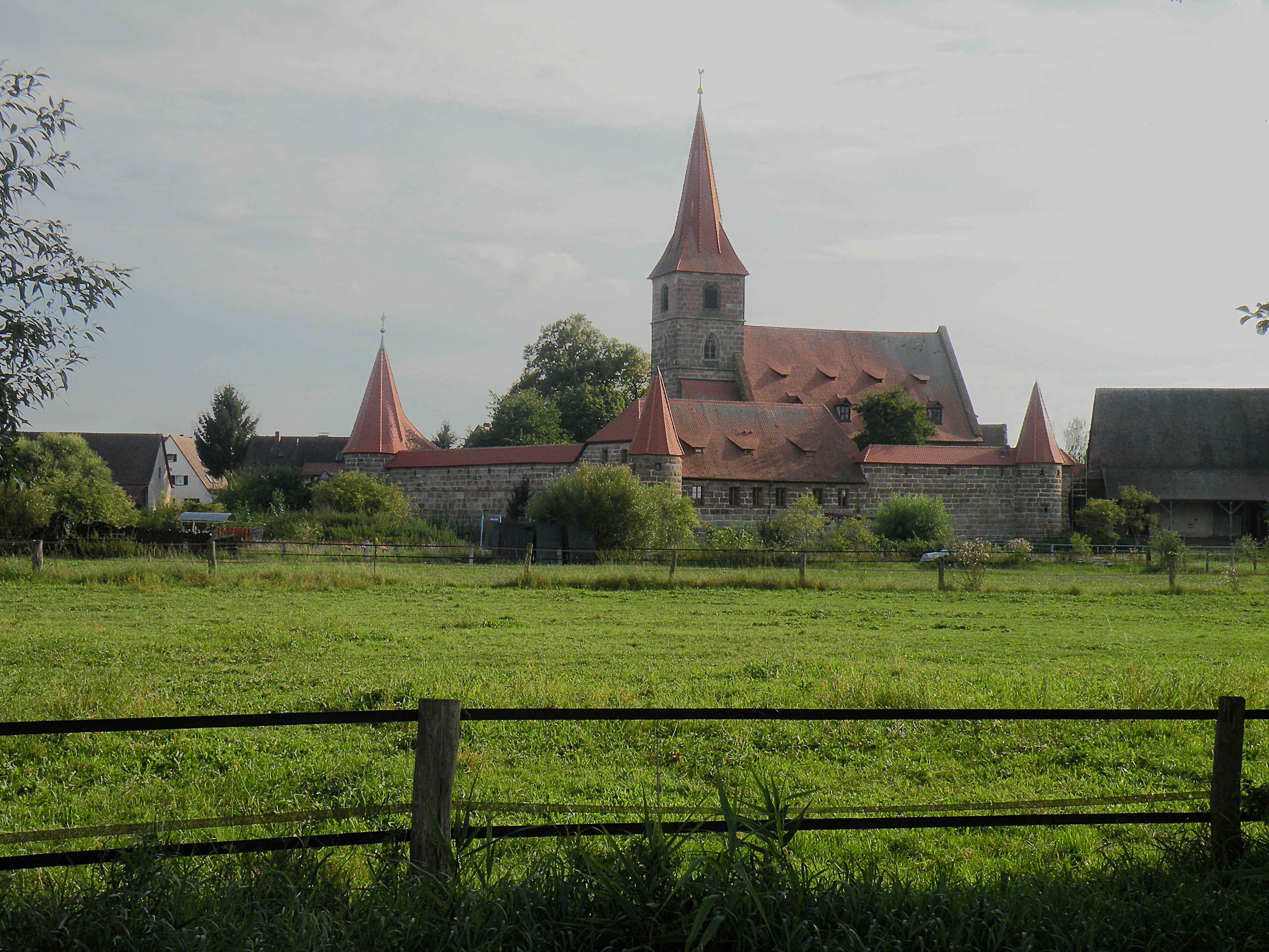 Wehrkirche St.Georgs in Kraftshof near Nuremberg